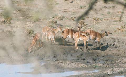 Nyala antilope; Eigen foto Zuid-Afrika, september 2003